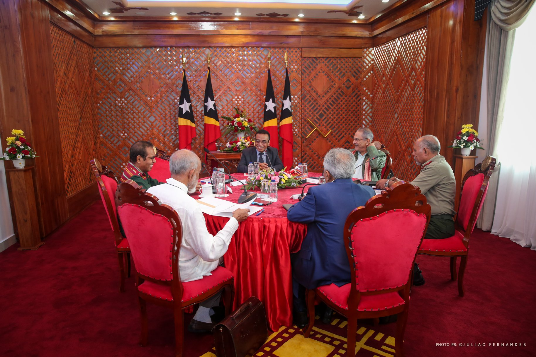 Treffen führender Politiker zur Staatskrise in Osttimor